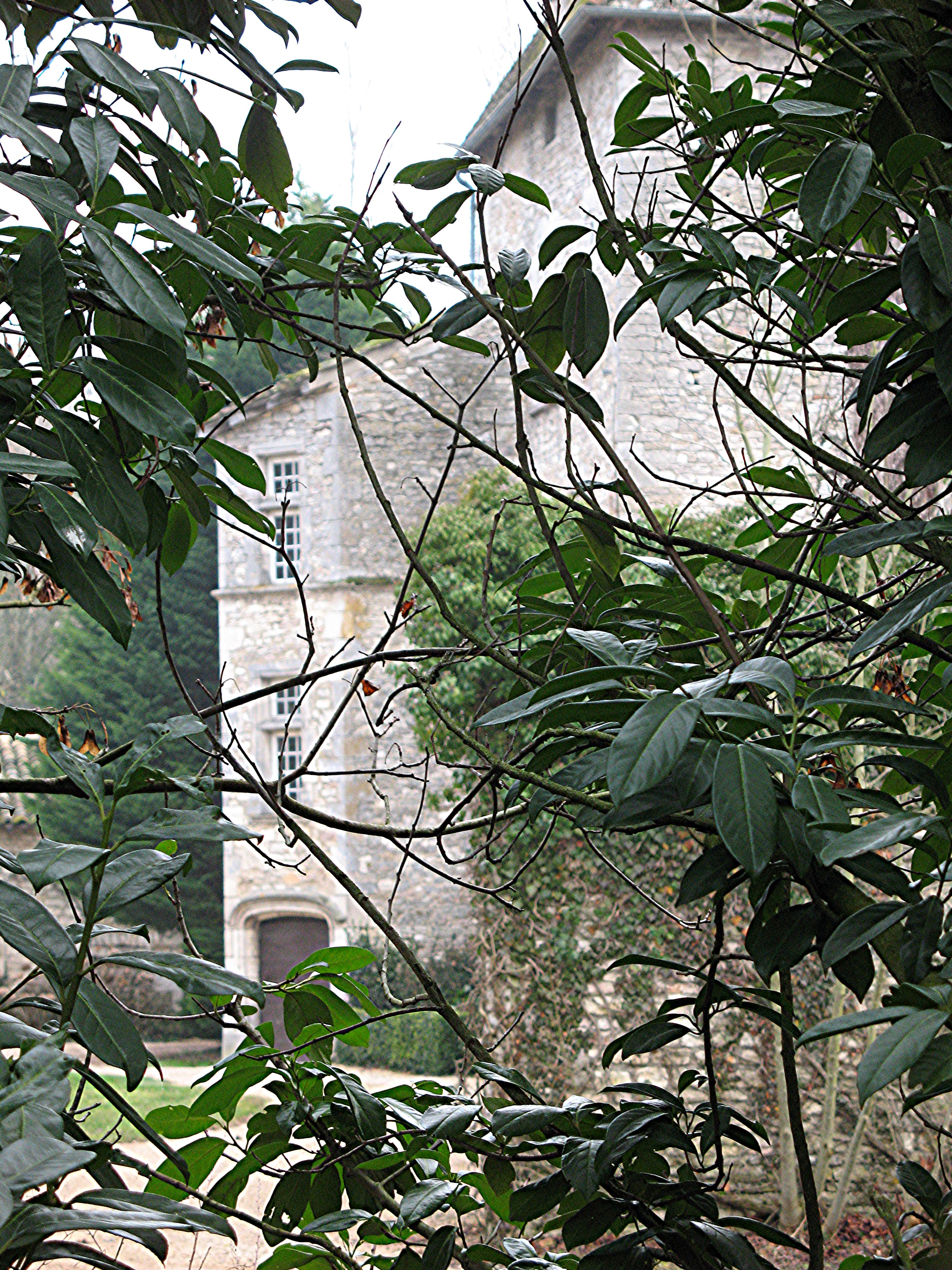 château de Buffières - Montbellet (Saône-et-Loire)